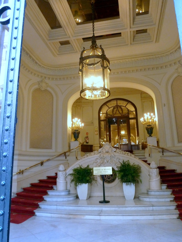 Casino de Madrid, Calle Alcalá, 15 : entrada, y Escalera de Honor.